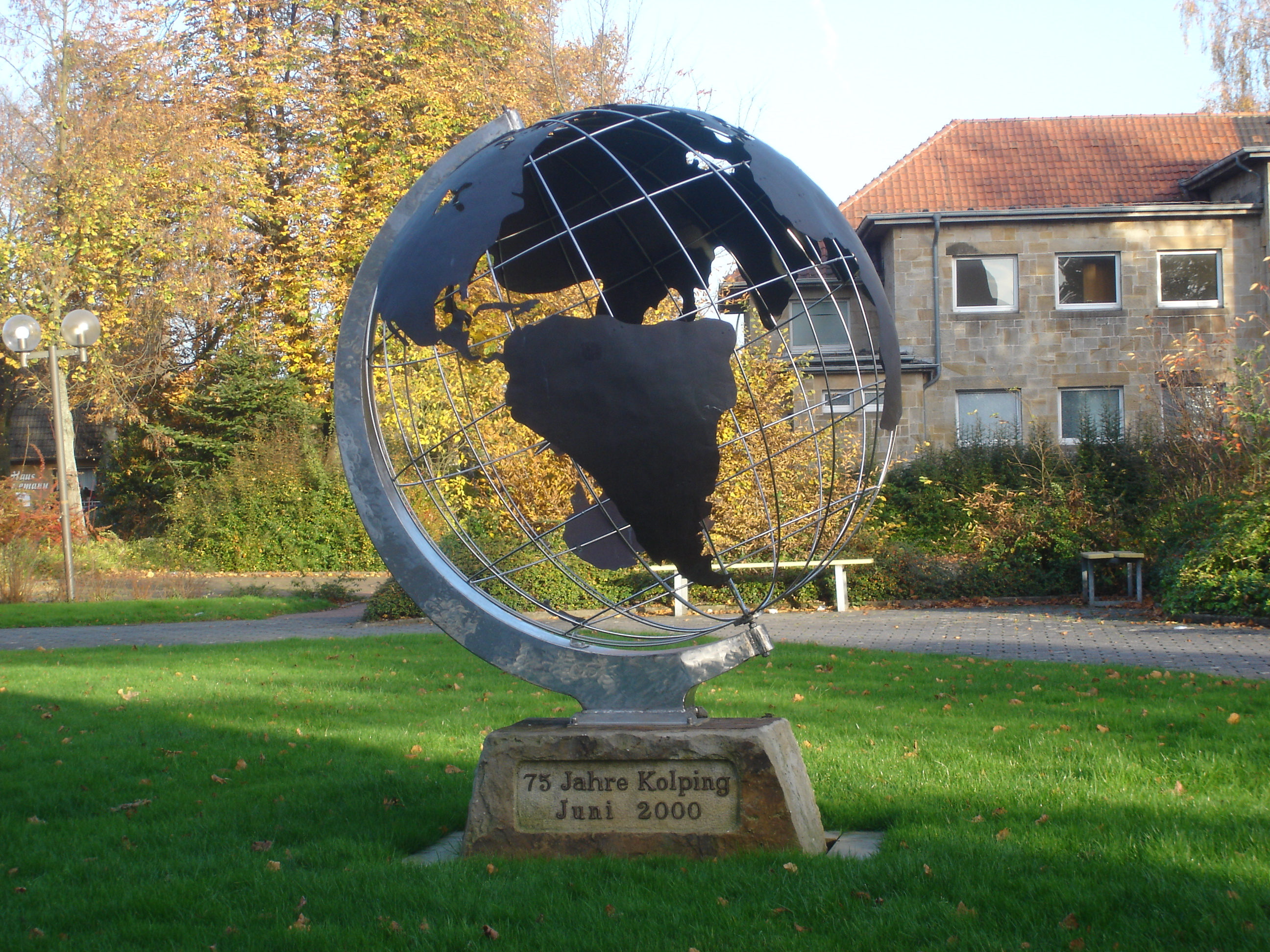 Monument of 75 years Kolping in Laggenbeck (borough of the city of Ibbenbüren). Die Monument wurde im Jahr 2000 durch acht Handwerker zum 75-jahrigen Jubiläum des Kolping angefertigt.[1]